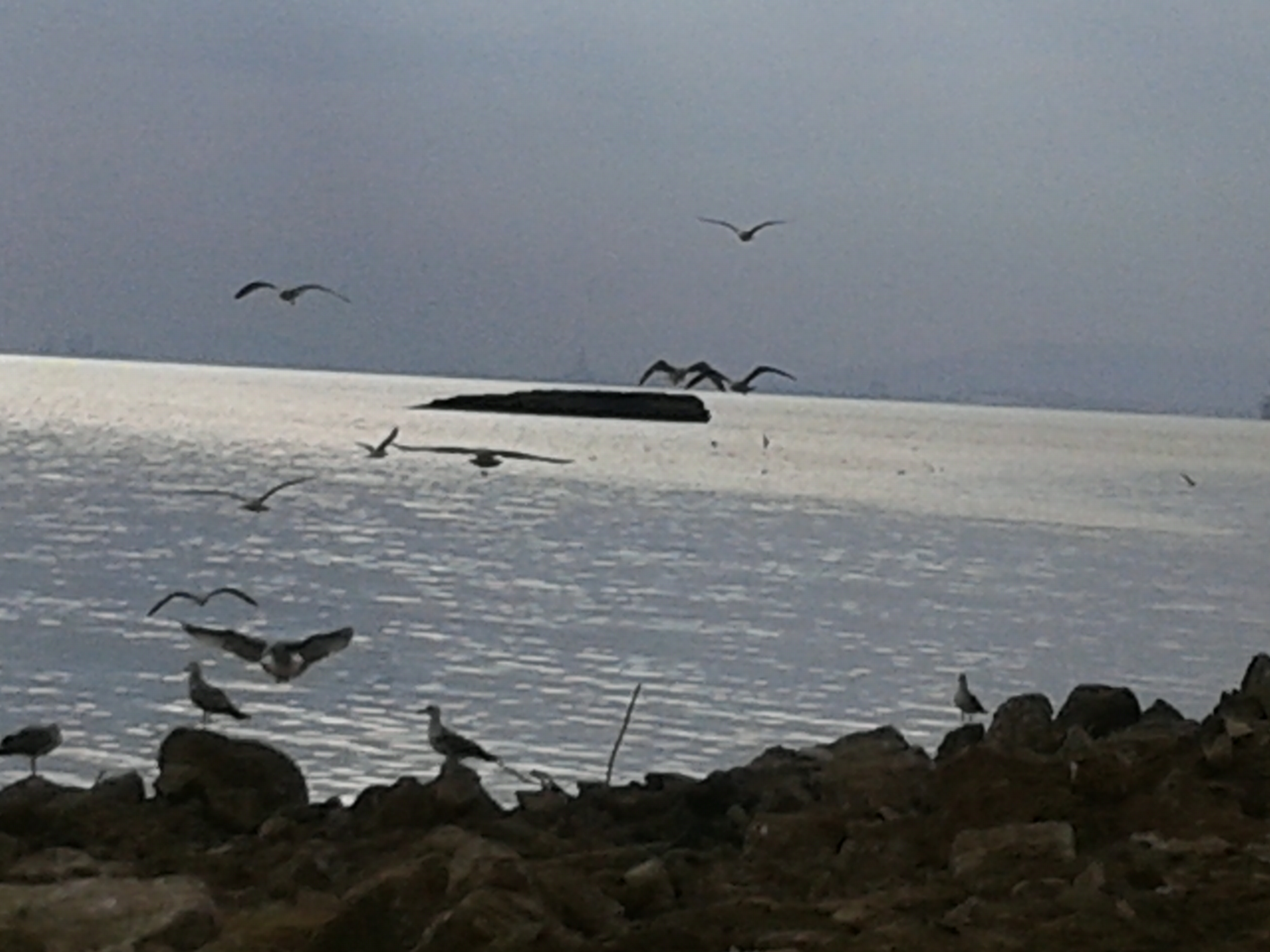 XƏzər ada